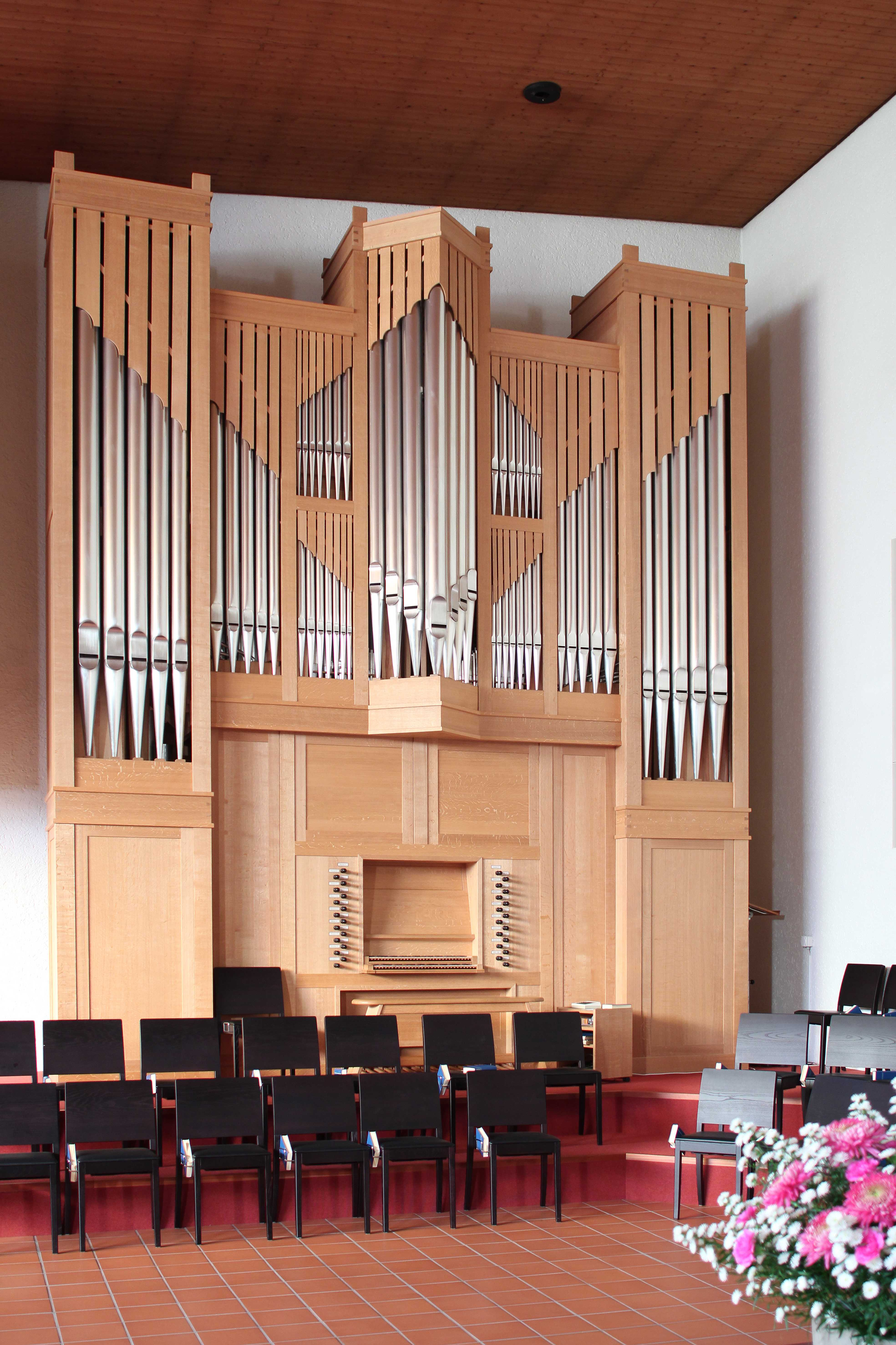 Römisch-katholische Kirche Allerheiligen Zürich-Neuaffoltern, Edskes-Orgel